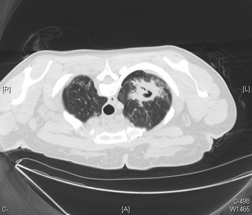 Cavitary tuberculosis - CT scan